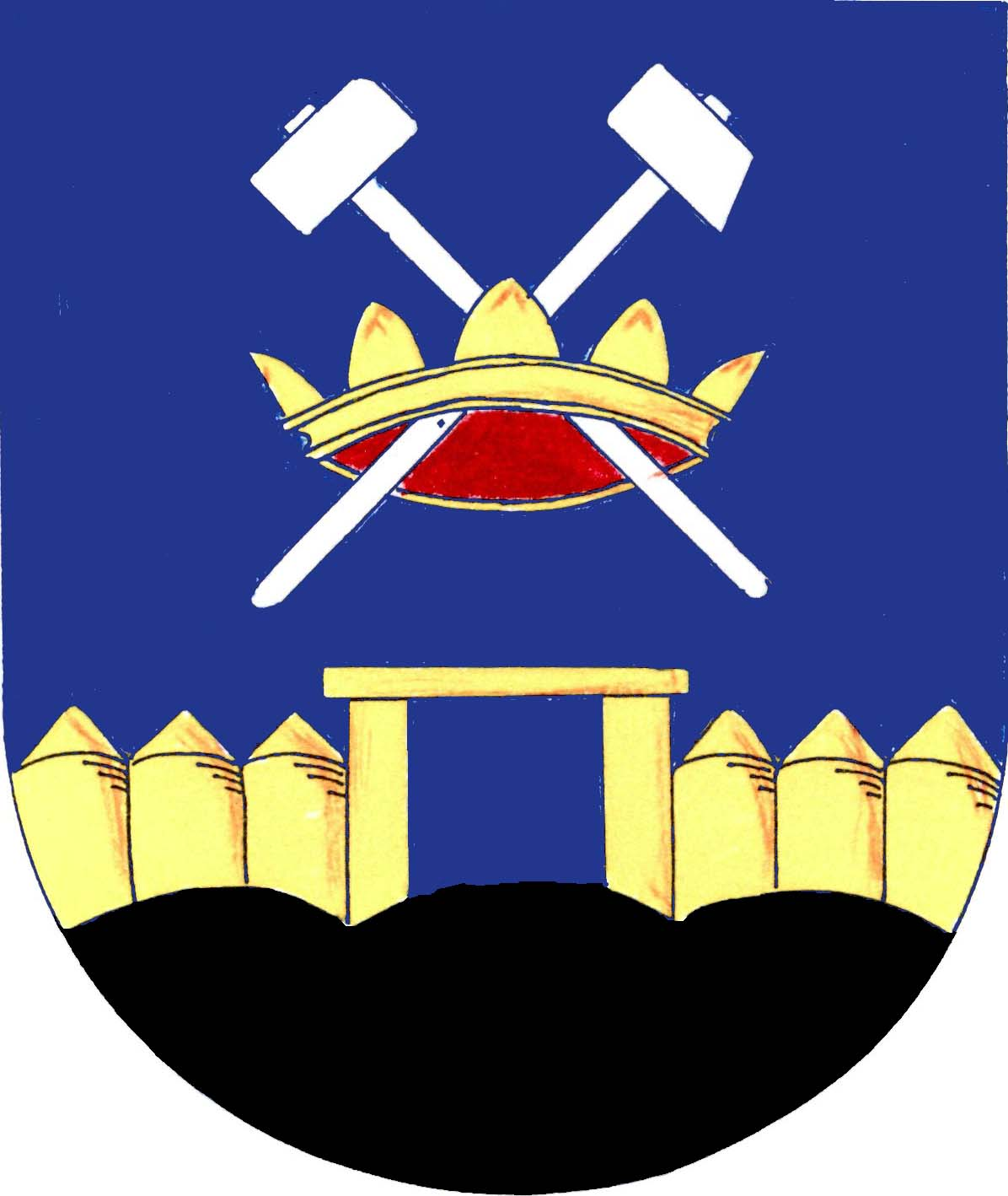 Znak obce Libušín